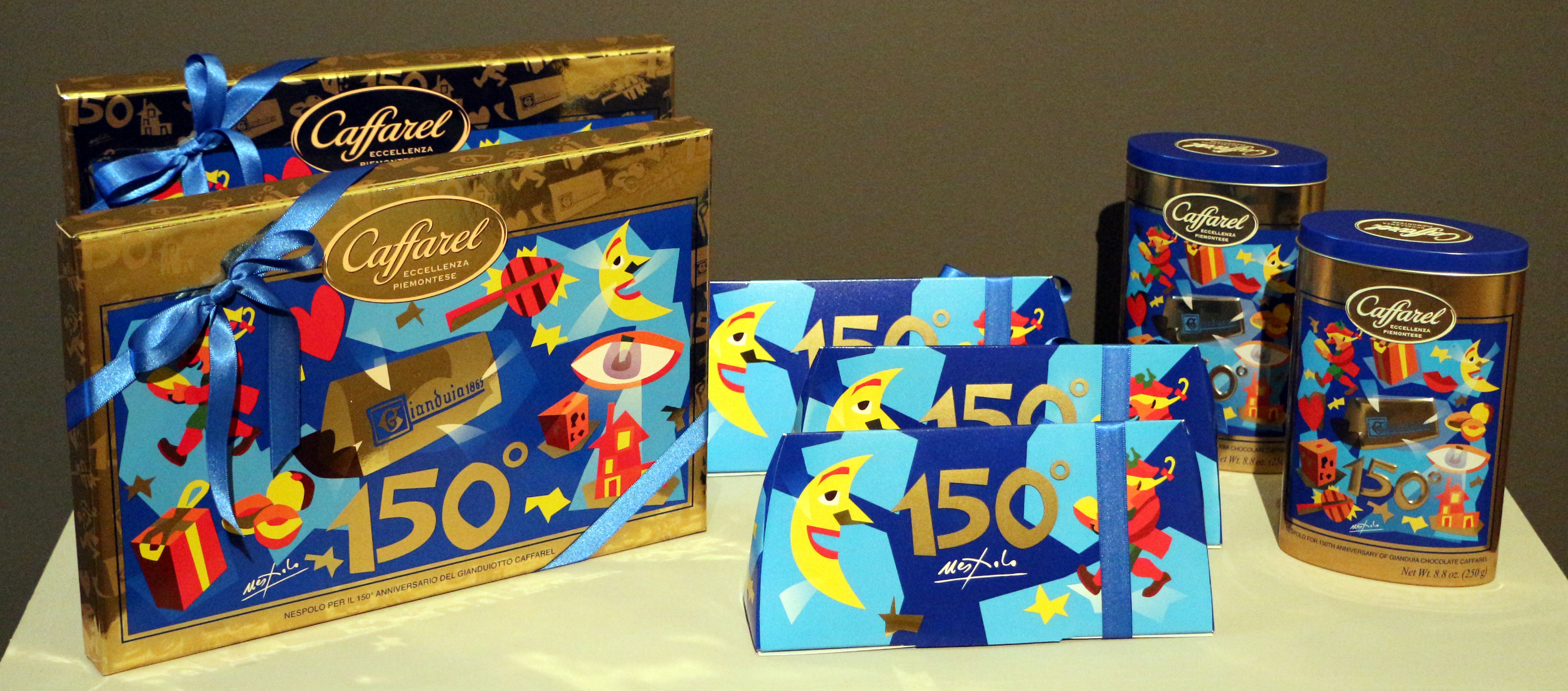 Corporate art exhibition (Galleria nazionale d'arte moderna 2015) This is a photo of a monument which is part of cultural heritage of Italy.